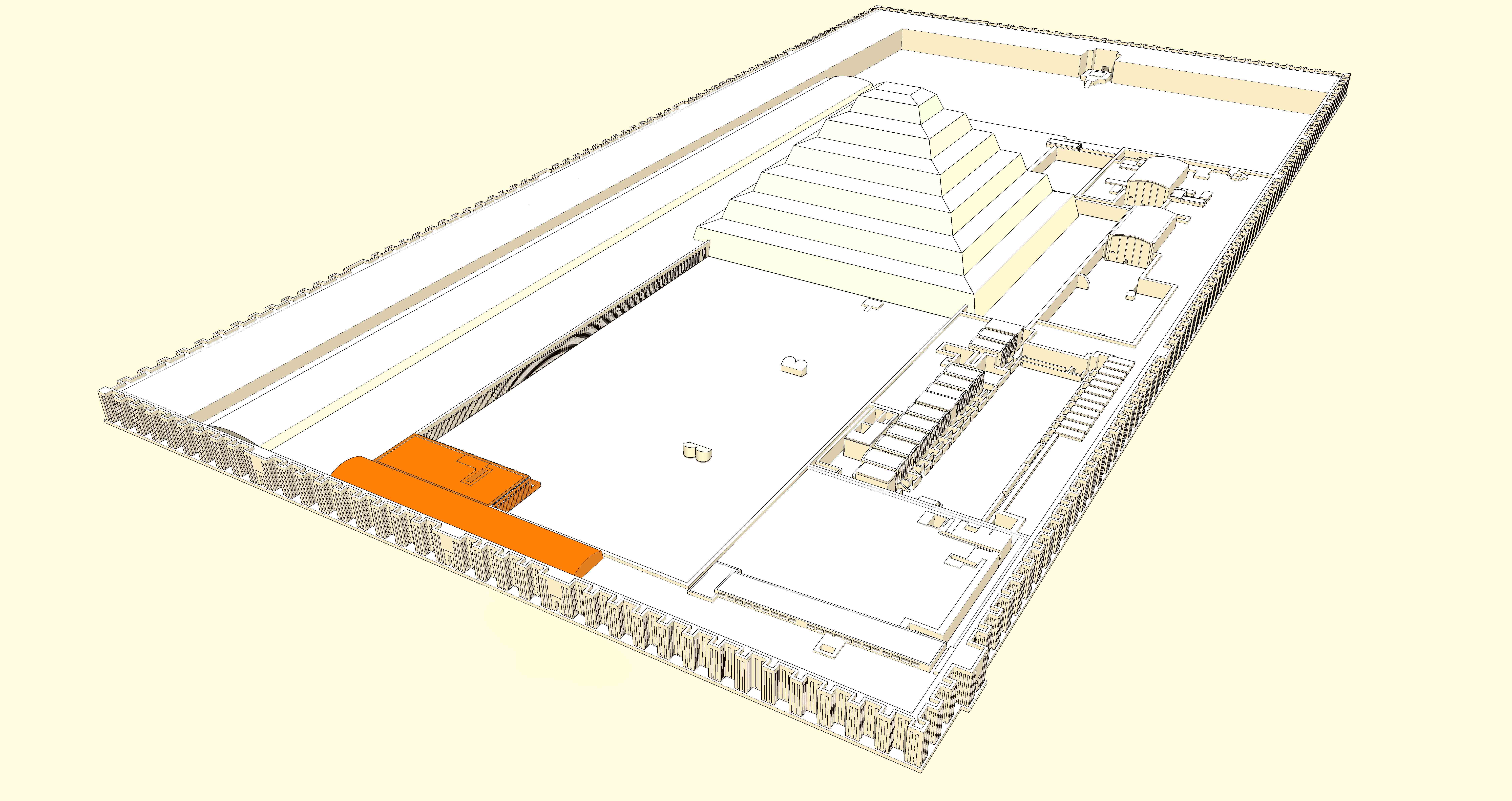 Position de la tombe sud du complexe funéraire de Djoser à Saqqarah